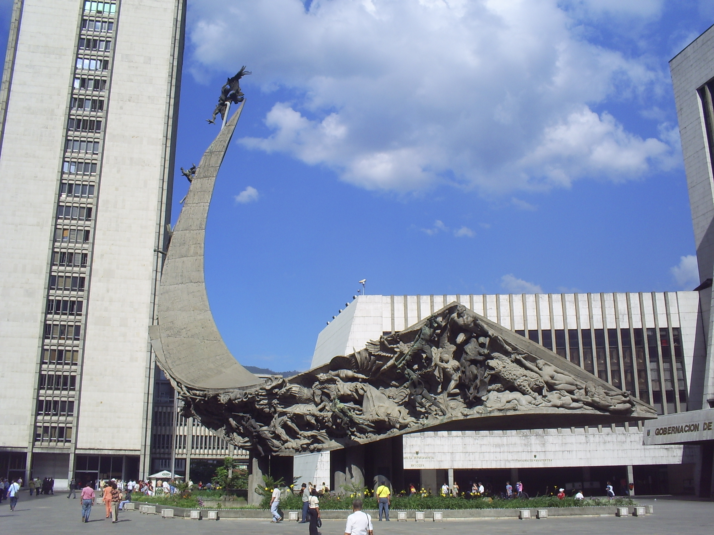 1979 - 1986 Monumento a la Raza, bronce y concreto, 38 m de alto. Localizado en el Centro Administrativo de La Alpujarra, Medellín, Colombia